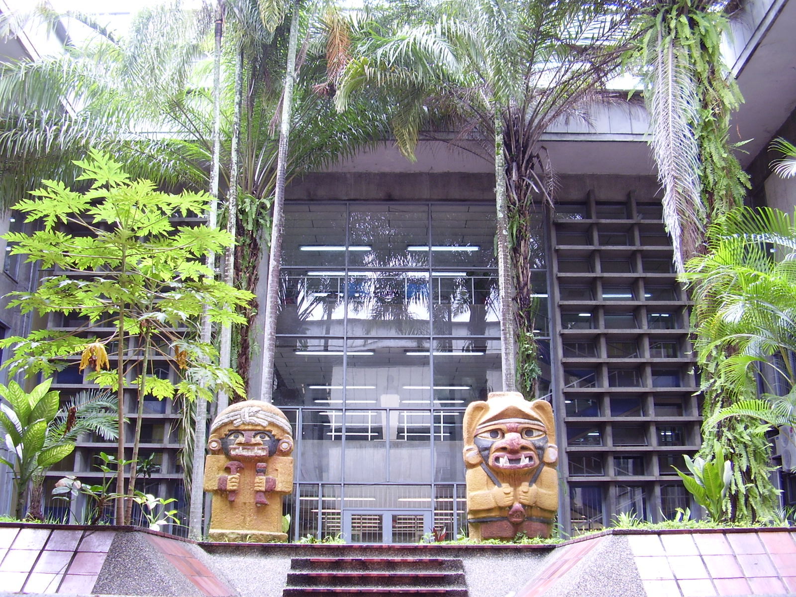 Plazoleta de la Biblioteca, Univalle, Cali-Colombia